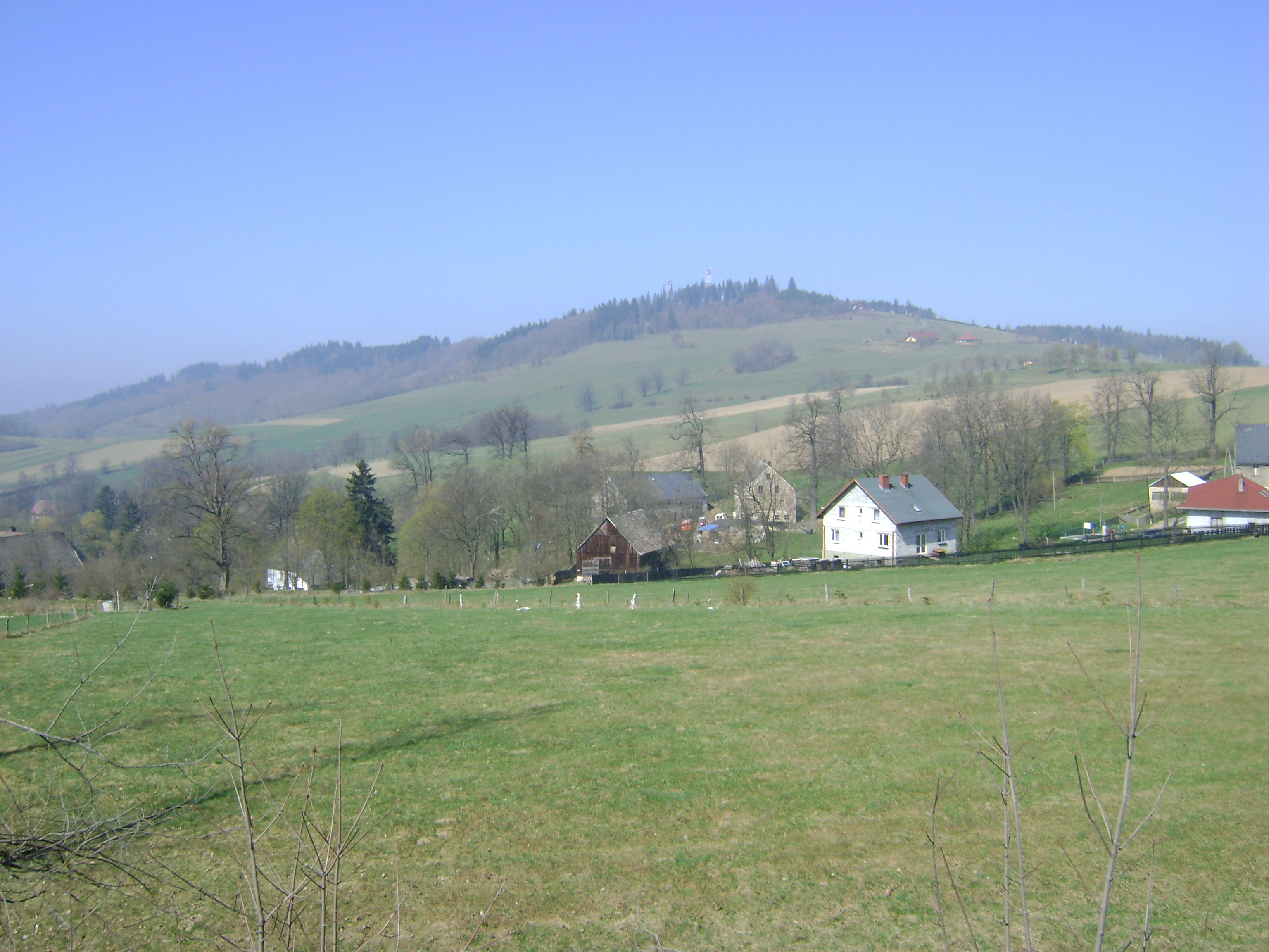 Łysa Góra - wzniesienie w południowo-zachodniej Polsce w Górach Kaczawskich (SudetyZachodnie) woj. dolnośląskie